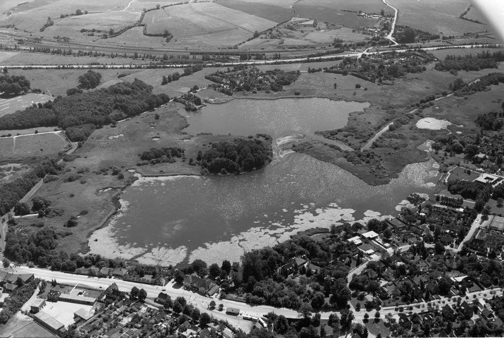 Blick von der Hamburger Chaussee mit der Gaststätte Eiderkrug (Bildmitte vorn) über den Schulensee zur Neuen Hamburger Chaussee (ganz hinten).